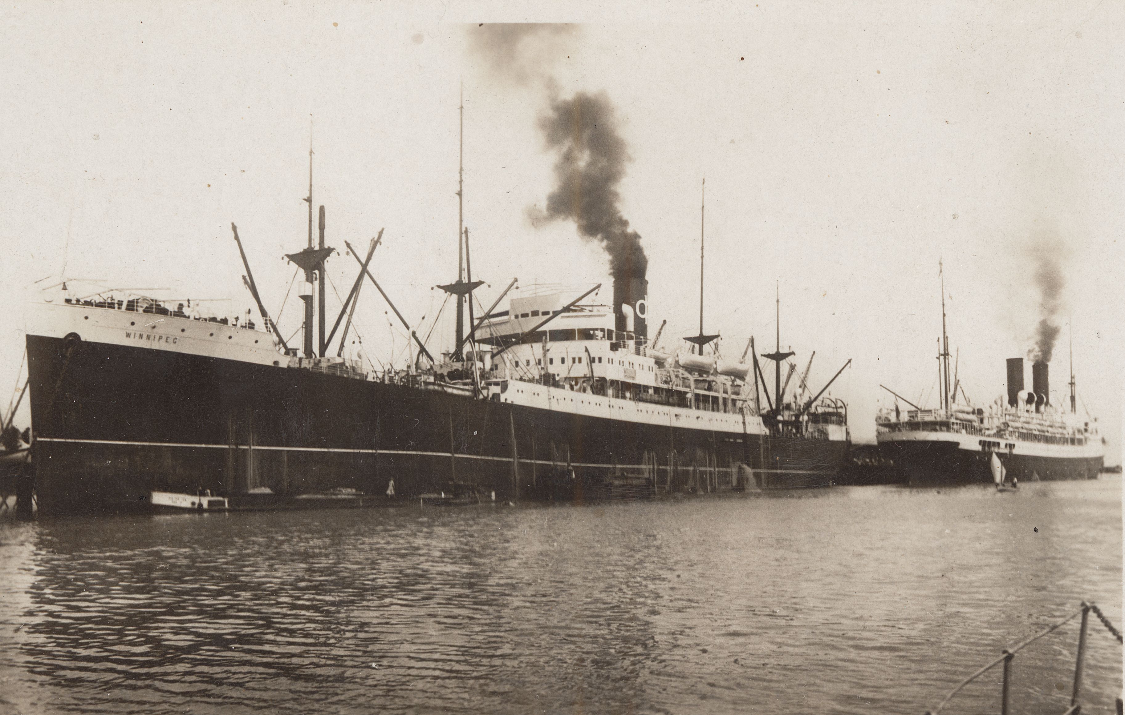 Vista general del barco francés Winnipeg.